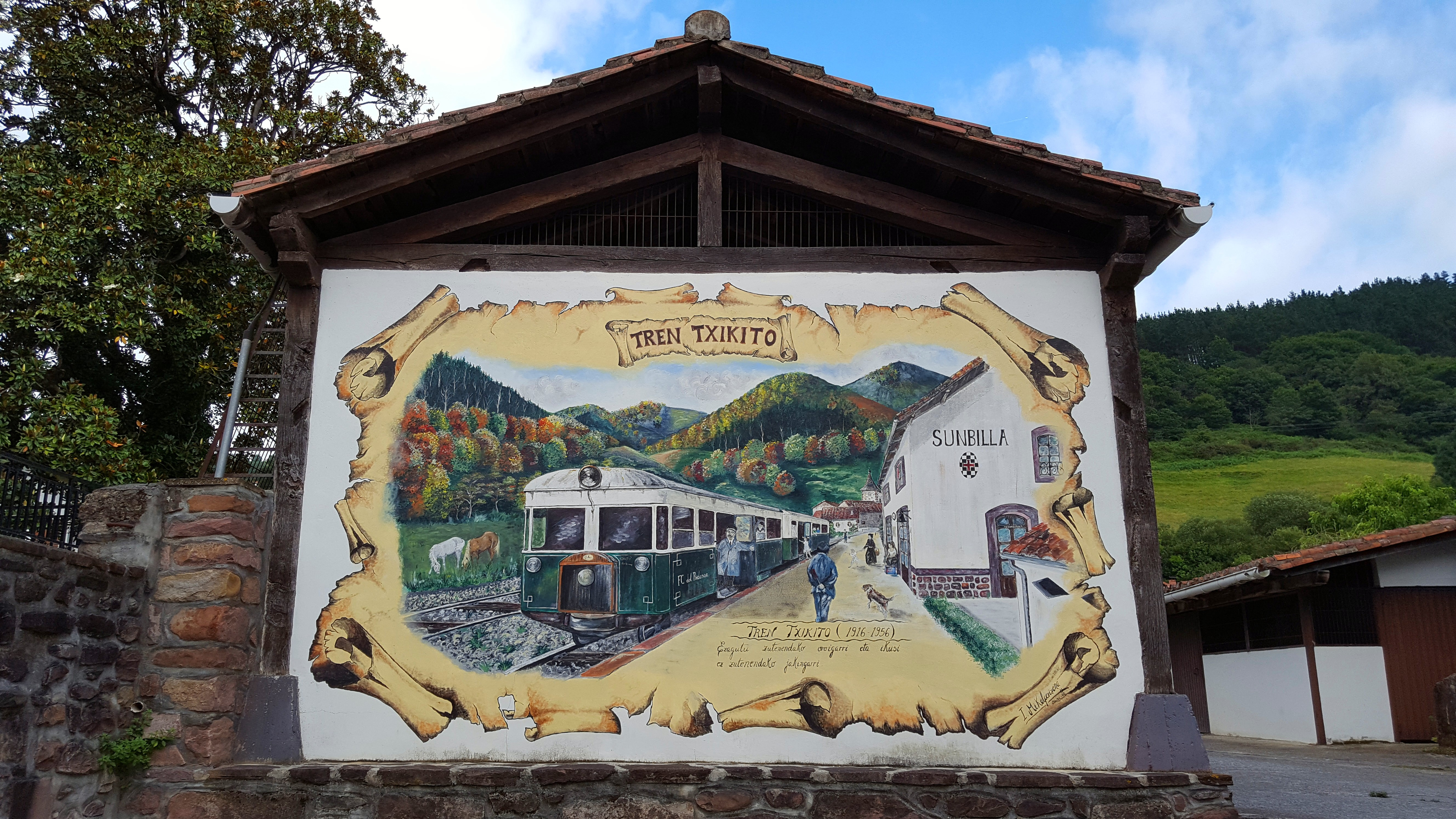 Nafarroako Sunbilla herria